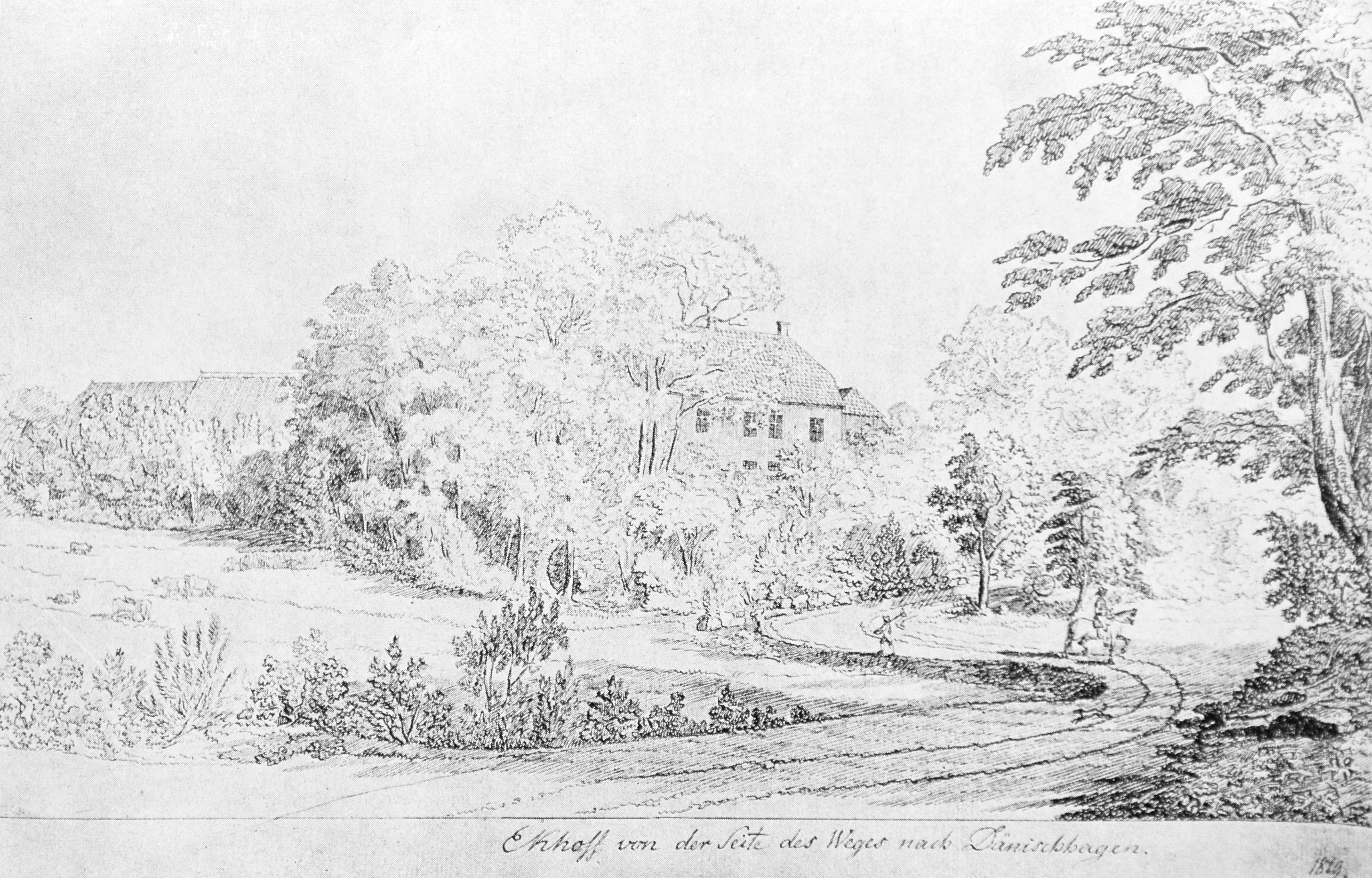 Gut Eckhof (Ekhoff), Federzeichnung von Sophie Reventlow, 1819